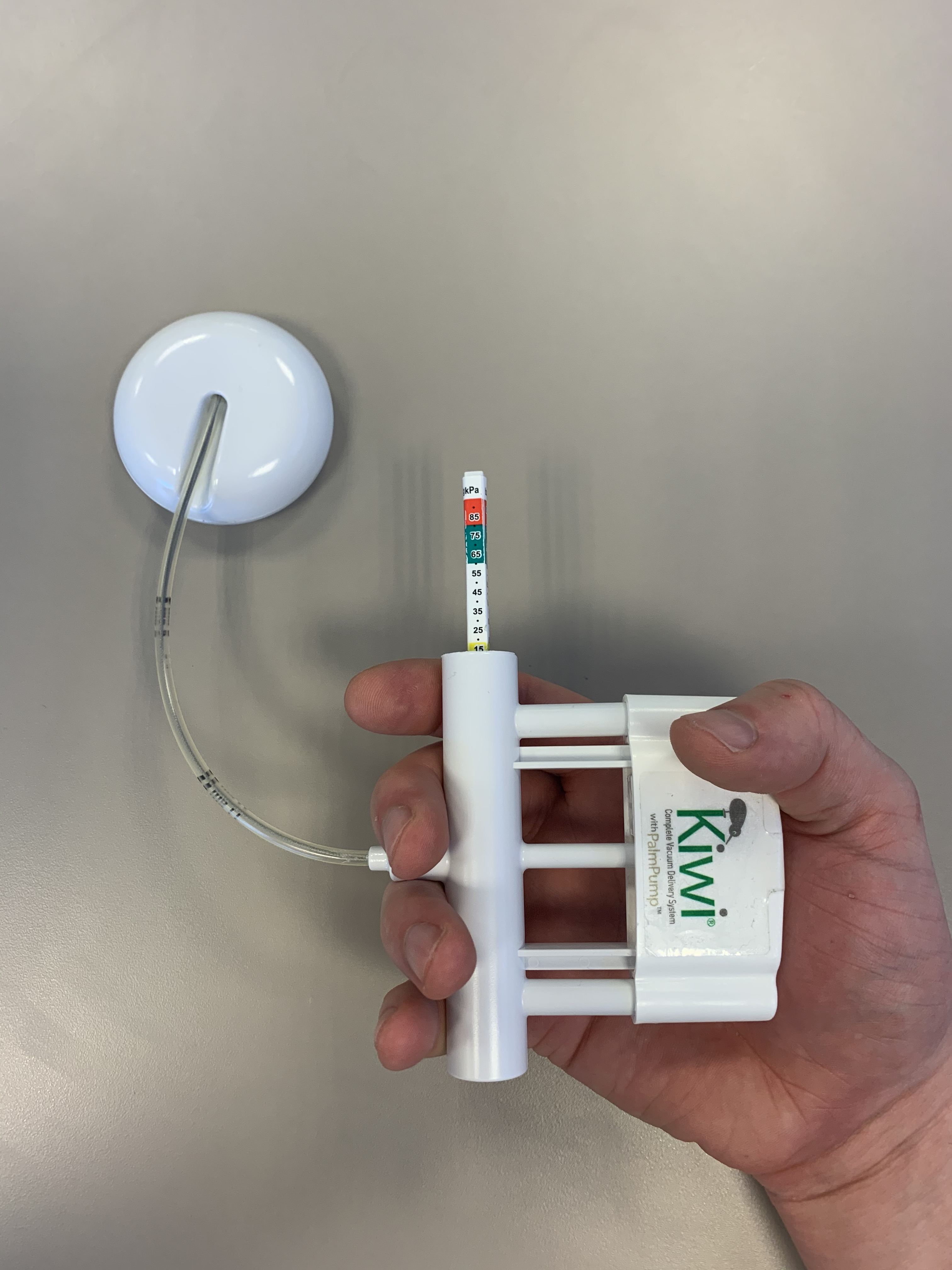 Foto van Kiwi-systeem